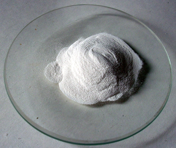 Al2O3